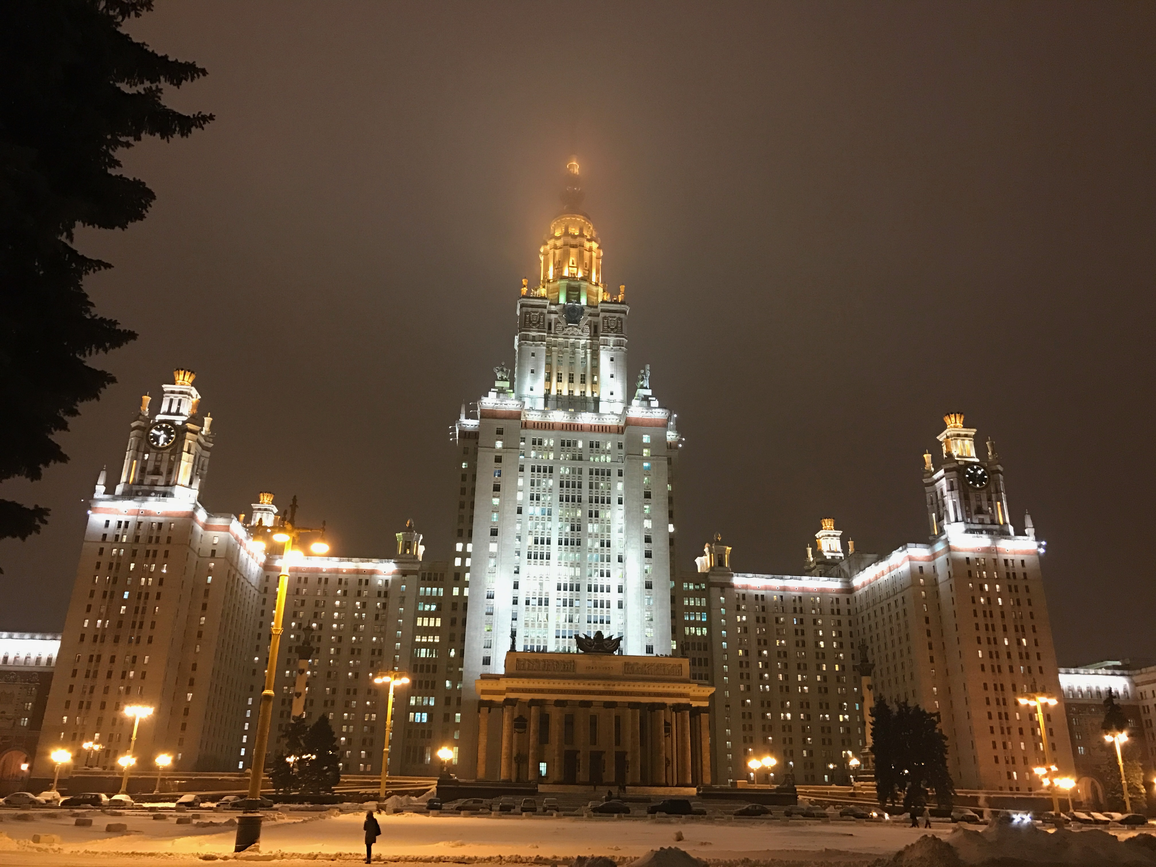 МГУ